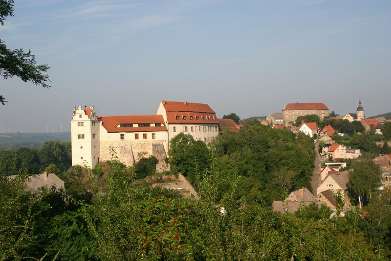 Wettin, eigenes Foto von 2004 Ansicht von Osten.